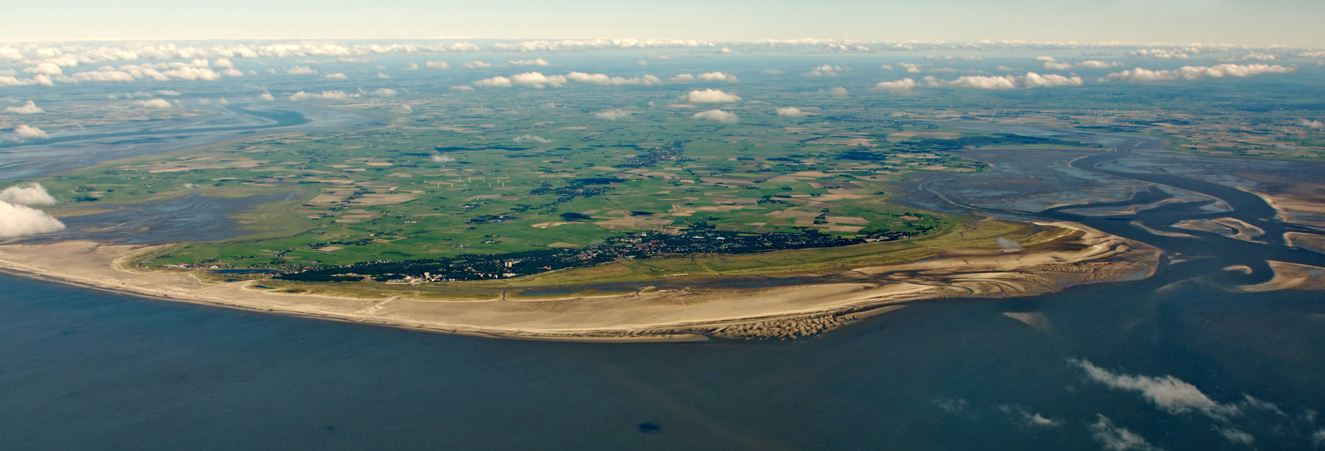 Fotoflug über das nordfriesische Wattenmeer: Sankt Peter-Ording